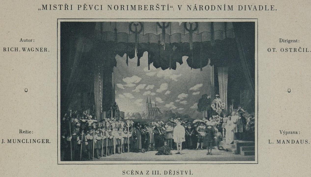 Mistři pěvci norimberští, Praha Národní divadlo, 1926